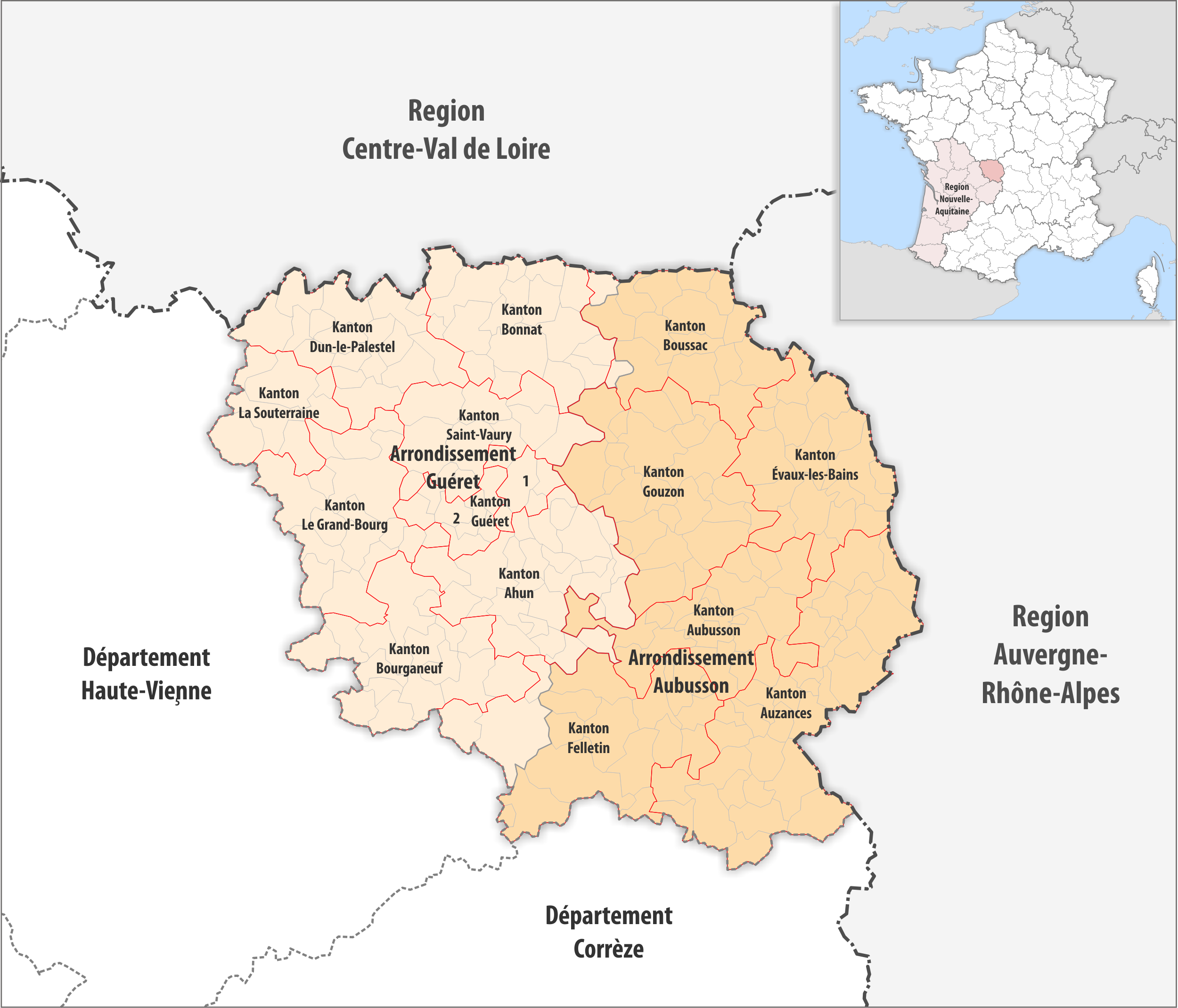 Gemeinden, Kantone und Arrondissemente im Departement Creuse